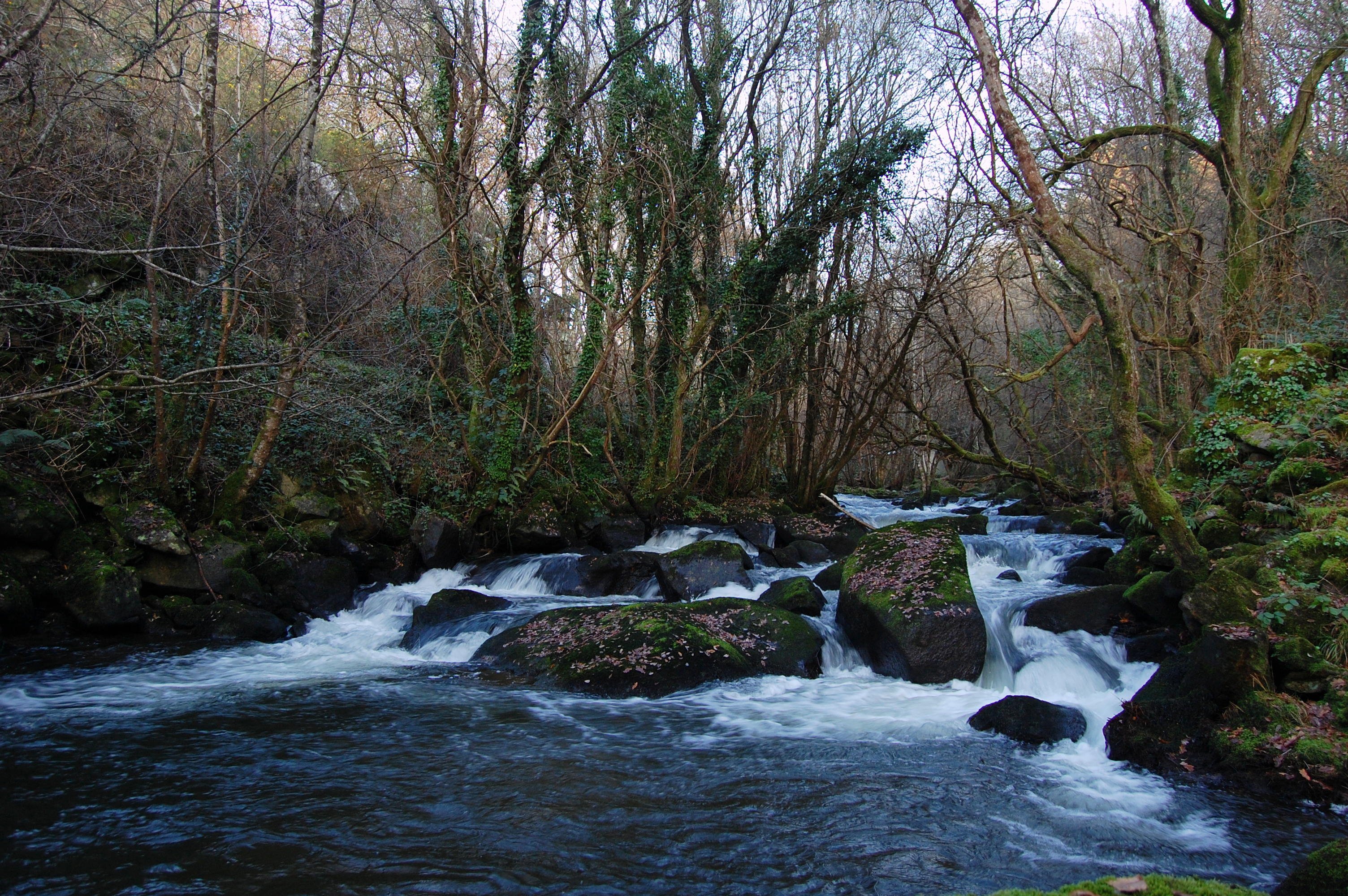 Río Pambre ó pé do Castelo de Pambre, en Palas de Rei, Lugo.